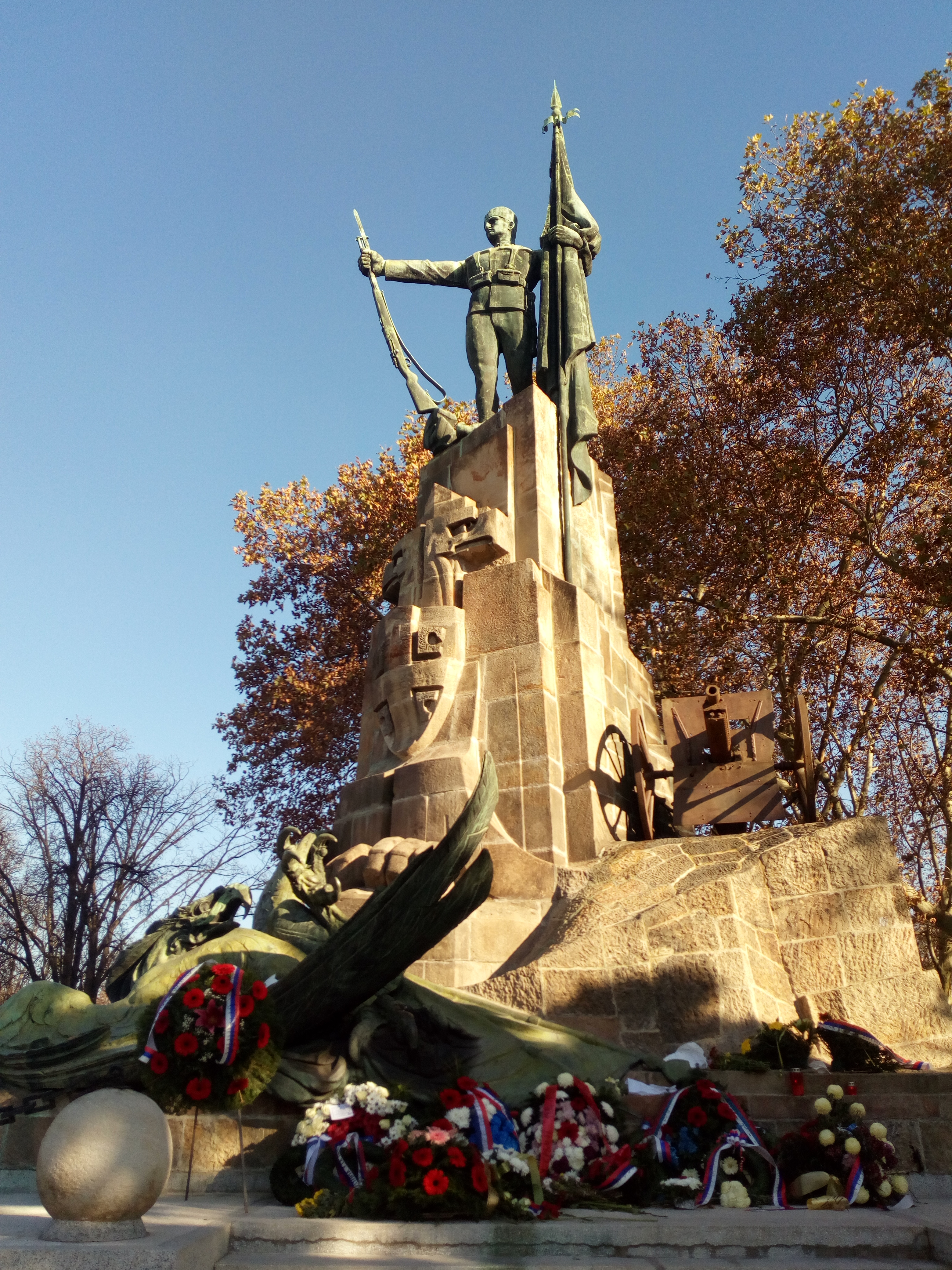 Спомен-костурница браниоцима Београда 1914—1918. на Новом гробљу у Београду.